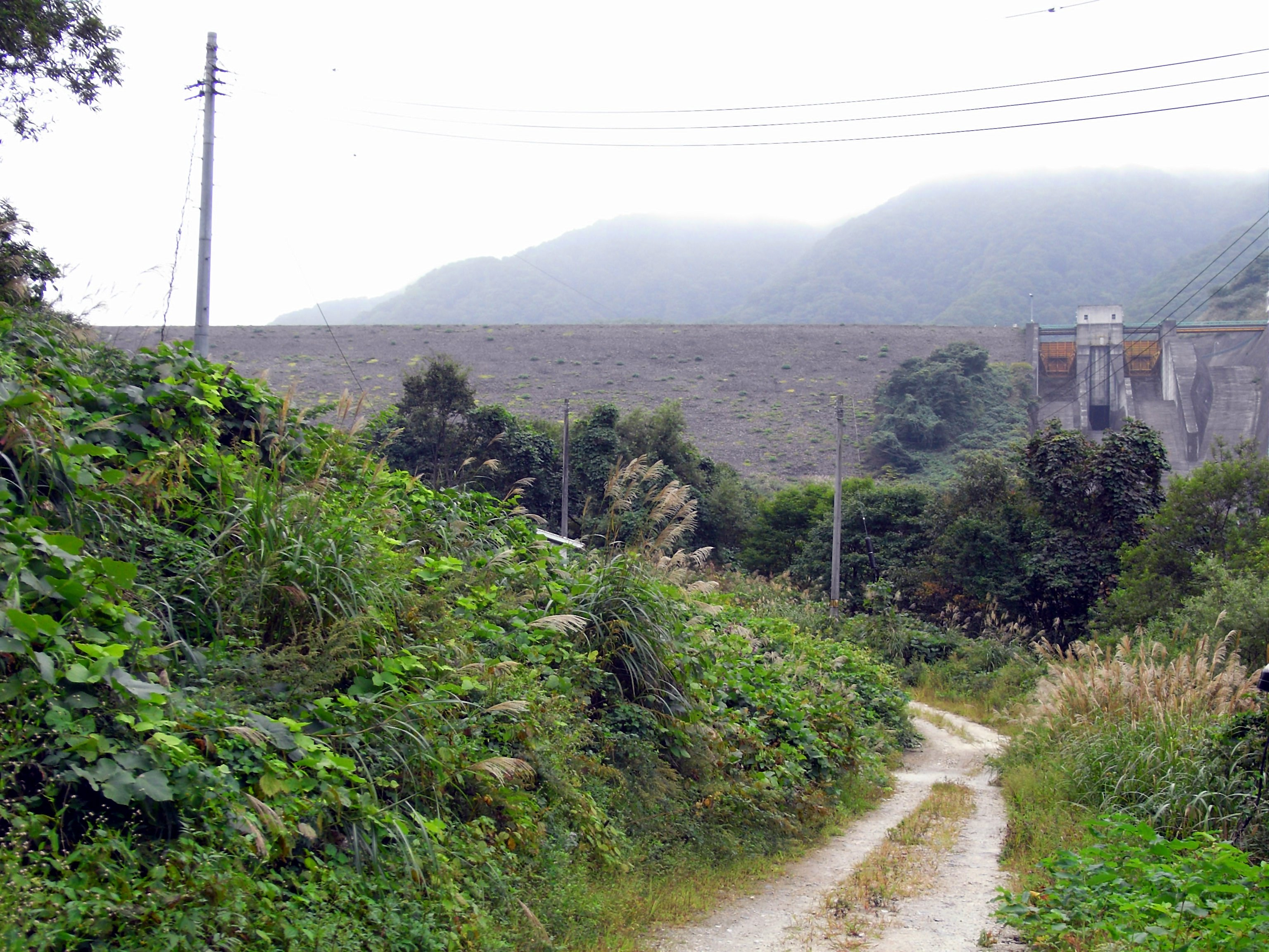 Dam